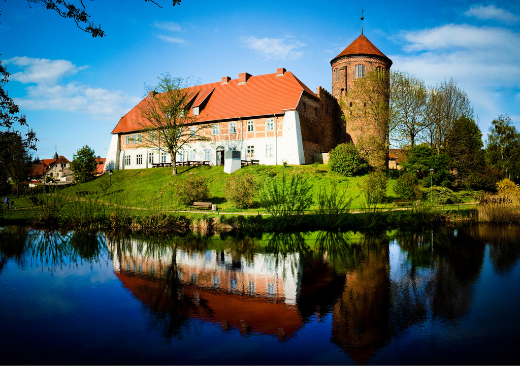 Die Burg Neustadt-Glewe, von Südwesten aus gesehen, mit Blick über den Burgteich.